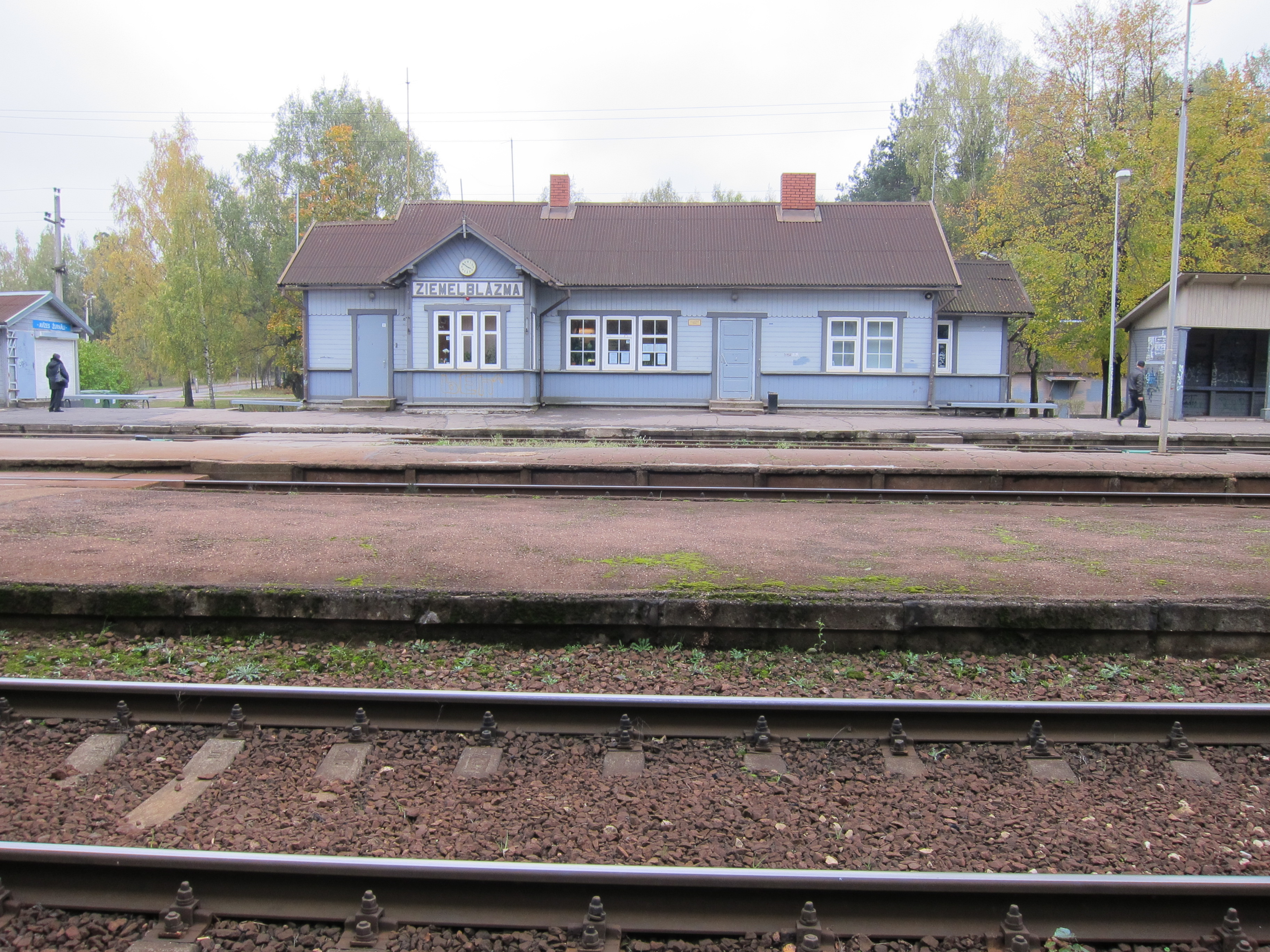 Ziemeļblāzmas stacijas ēka un sliežu ceļi